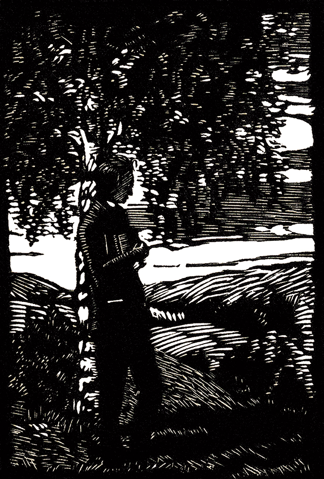 Detail Exlibris pro O. Zemka od výtvarníka Jaroslava Dobrovolského z roku 1928 zhotovený technikou dřevorytu.